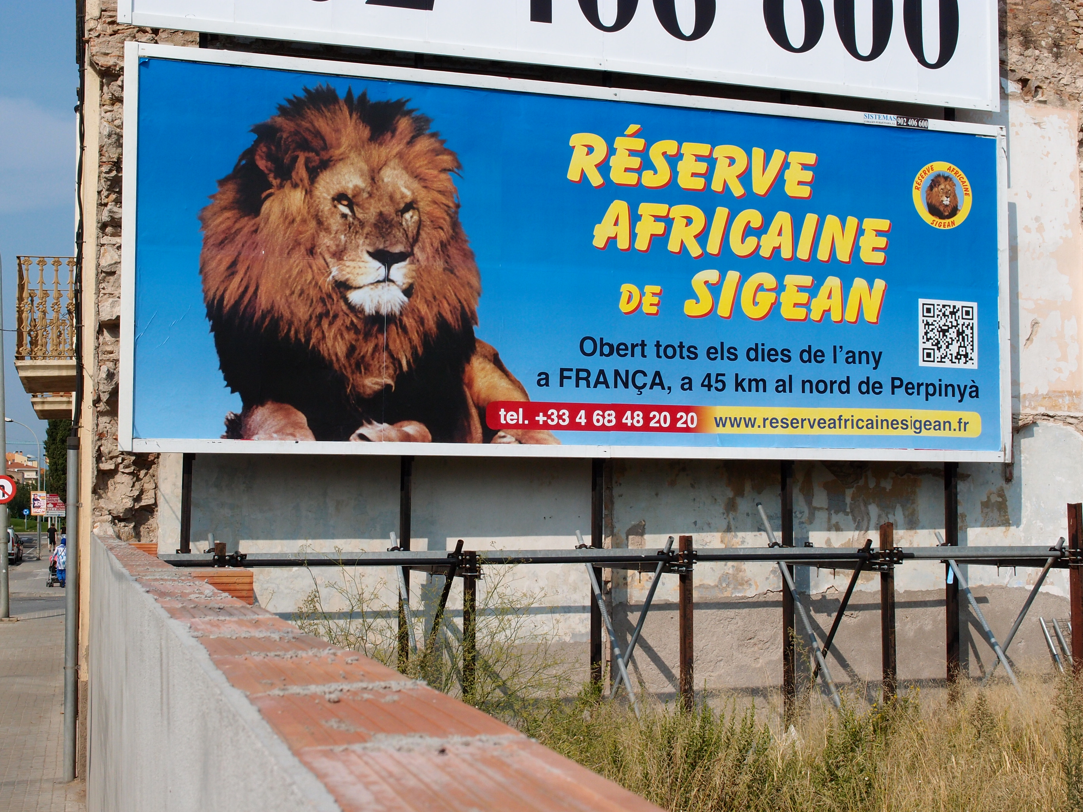 Auf unbefristete Dauer (langjährig) befestigtes Werbeplakat für das Réserve Africaine in Sigean (Frankreich) - Die Aufnahme wurde in Figueres (Katalonien/Spanien) vom öffentlichen Bürgersteig aus gemacht. Datum: 12.09.2012 Urheber: M. Pfeiffer alias Benutzer:Gordito1869 Quelle: privates Fotoarchiv des Urhebers